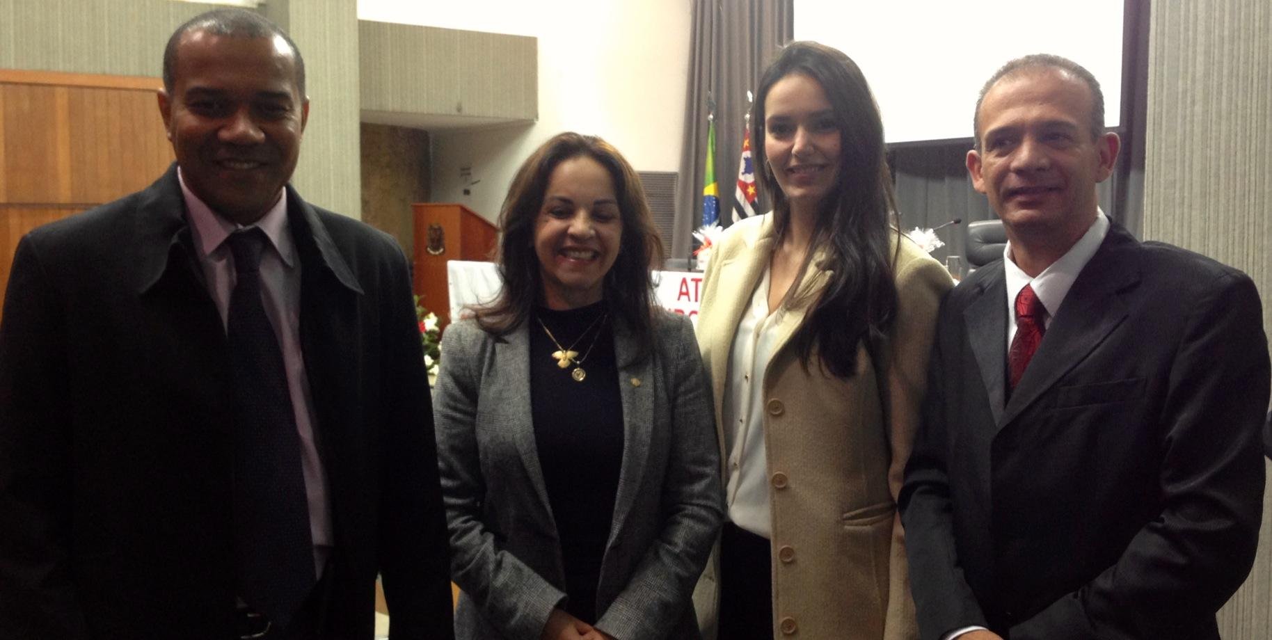 Em 27 de maio de 2013, Rosane Ferreira recebeu uma homenagem do Sindicato dos Enfermeiros do Estado de São Paulo pela sua luta em defesa dos interesses dos profissionais de enfermagem de todo o país.